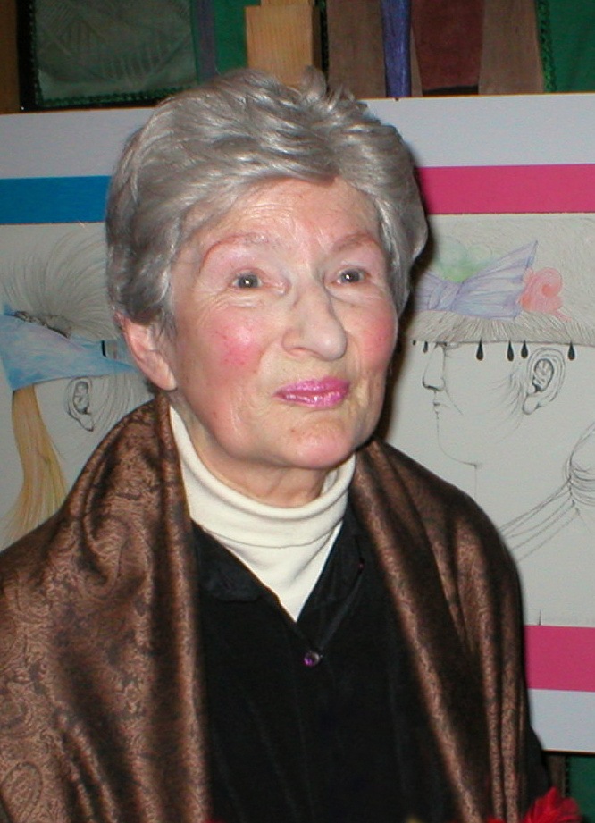 Barbara Gawdzik-Brzozowska w dniu wernisażu w Galerii Hasiora w Zakopanem.